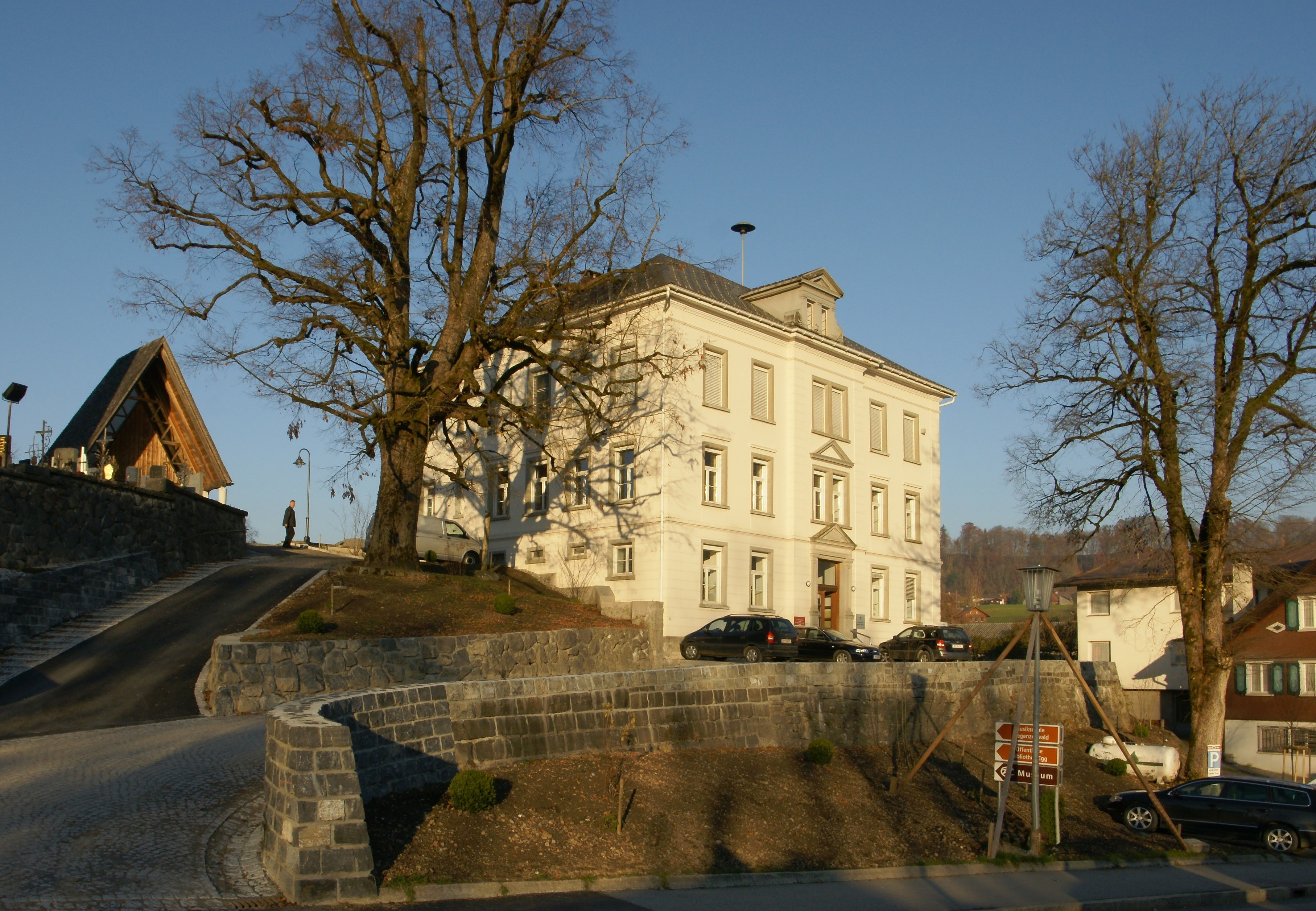 spätgründerzeitliches auch Späthistorisches , öffentliches Gebäude: das alte Schul- und Gemeindehaus am Pfarrhof Nr.5 in Egg (Vorarlberg), erbaut 1899 im Bregenzerwald. Nach BDA denkmalgeschütztes Objekt.